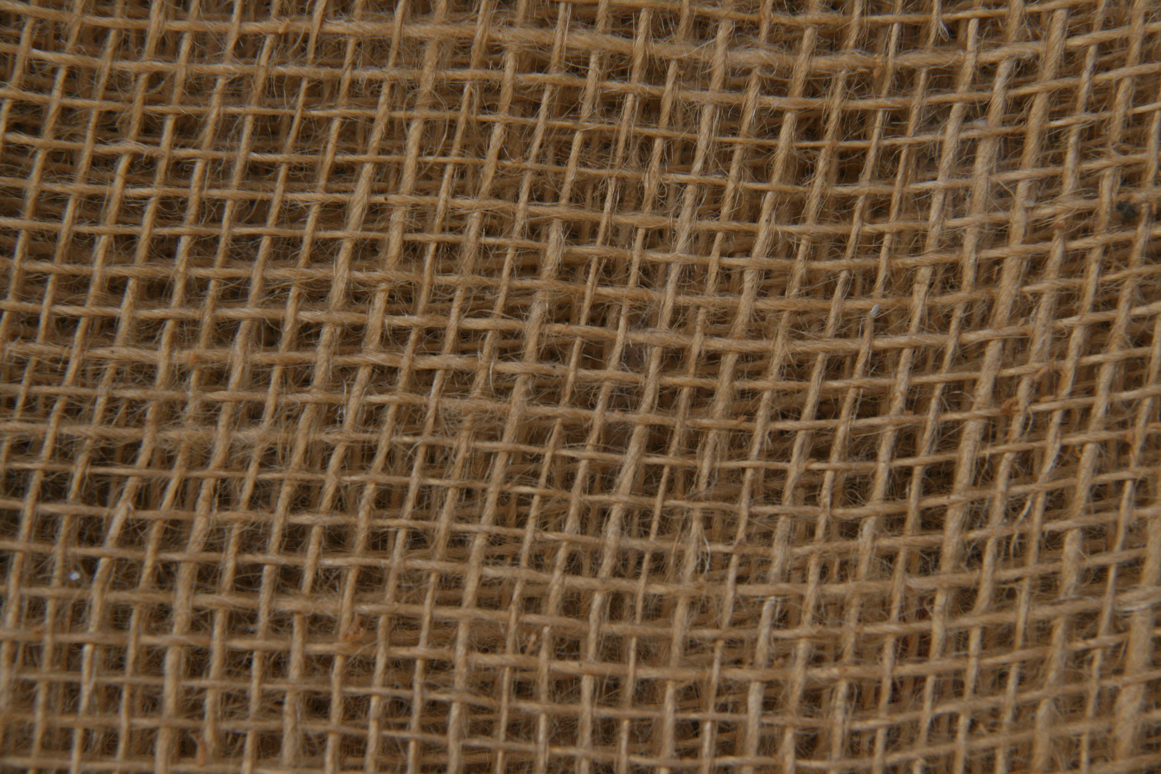 Tejido de Corchorus capsularis (Yute) - Tela de saco